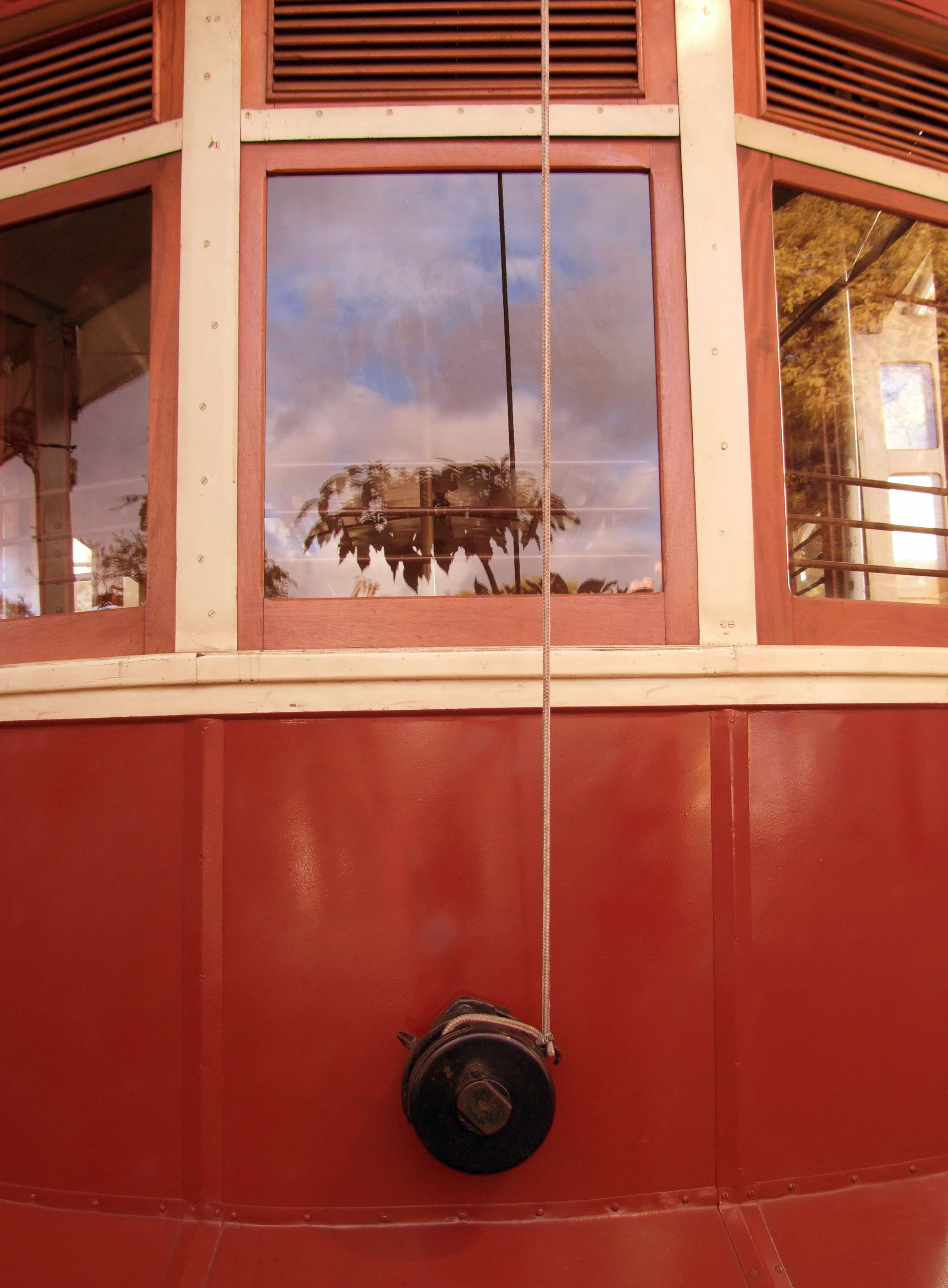 Transporte público, elétrico do seculo passado, Brazil